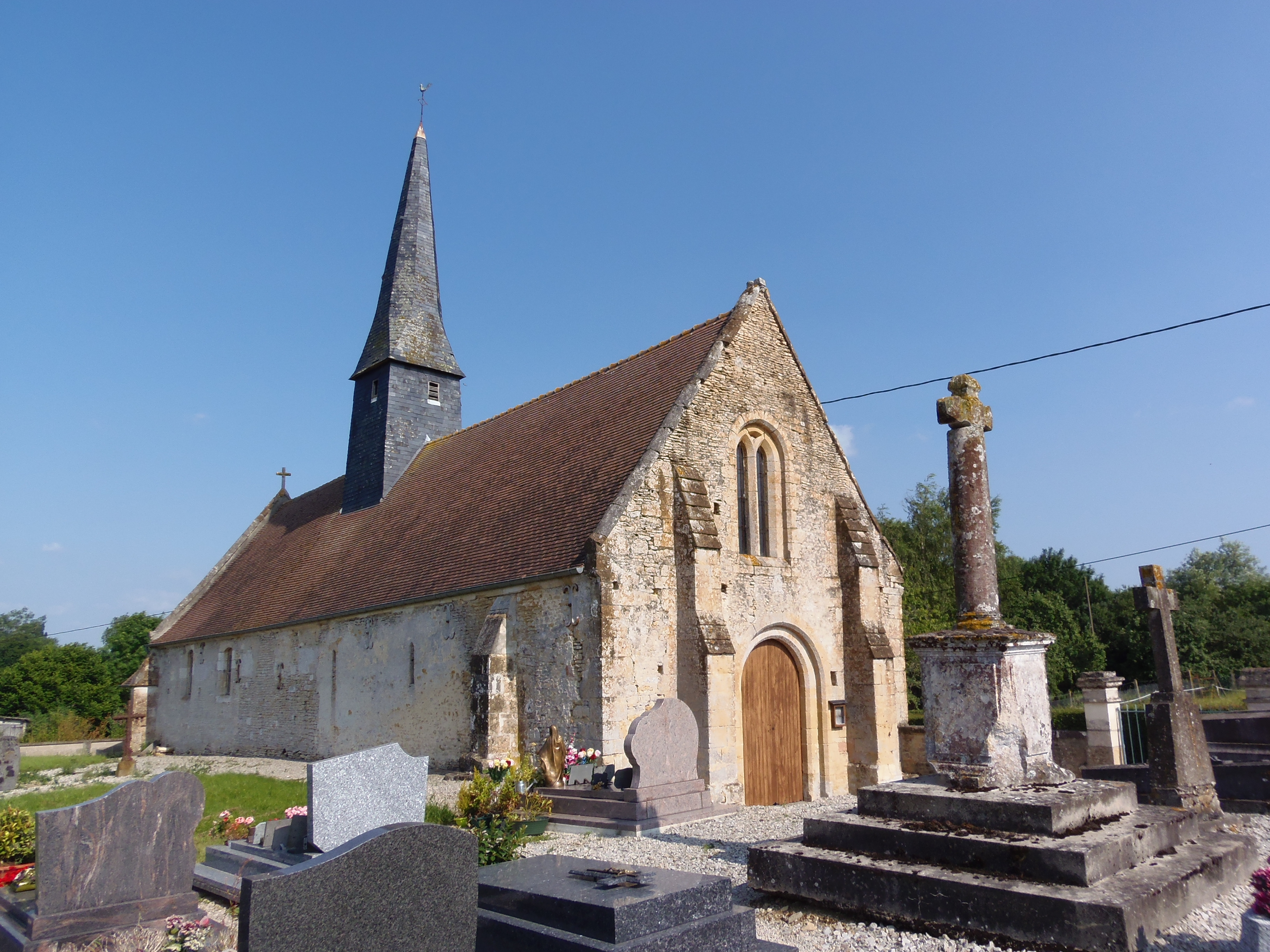 Vaudeloges (Normandie, France). L'église de Réveillon.